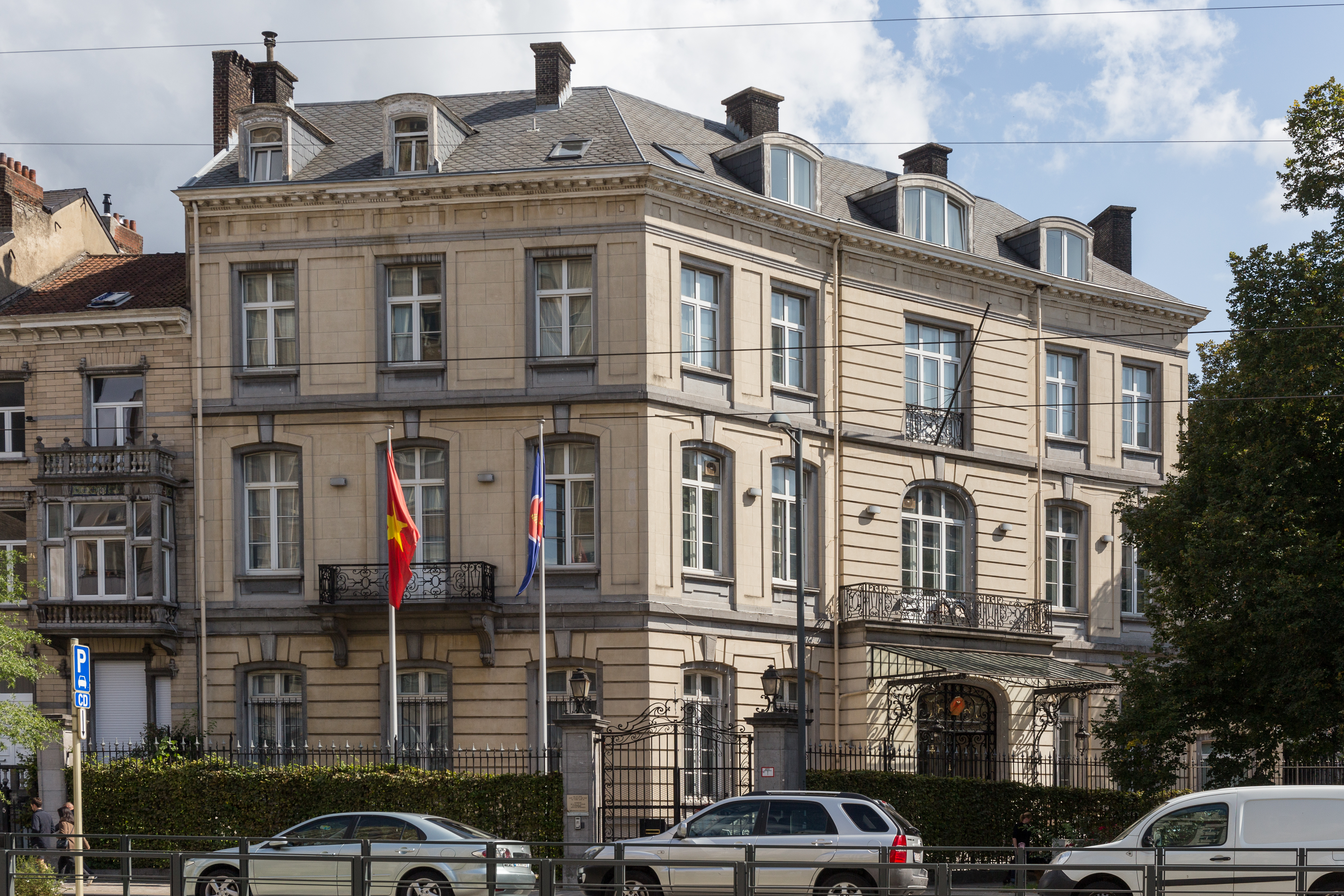 Ambassade du Viêt Nam en Belgique, boulevard Général Jacques 1 à Ixelles.